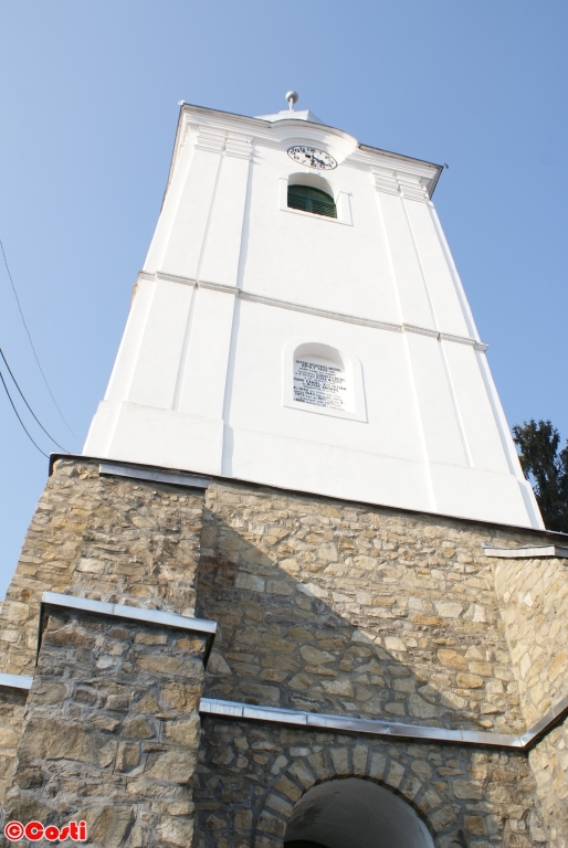 Biserica reformată 01